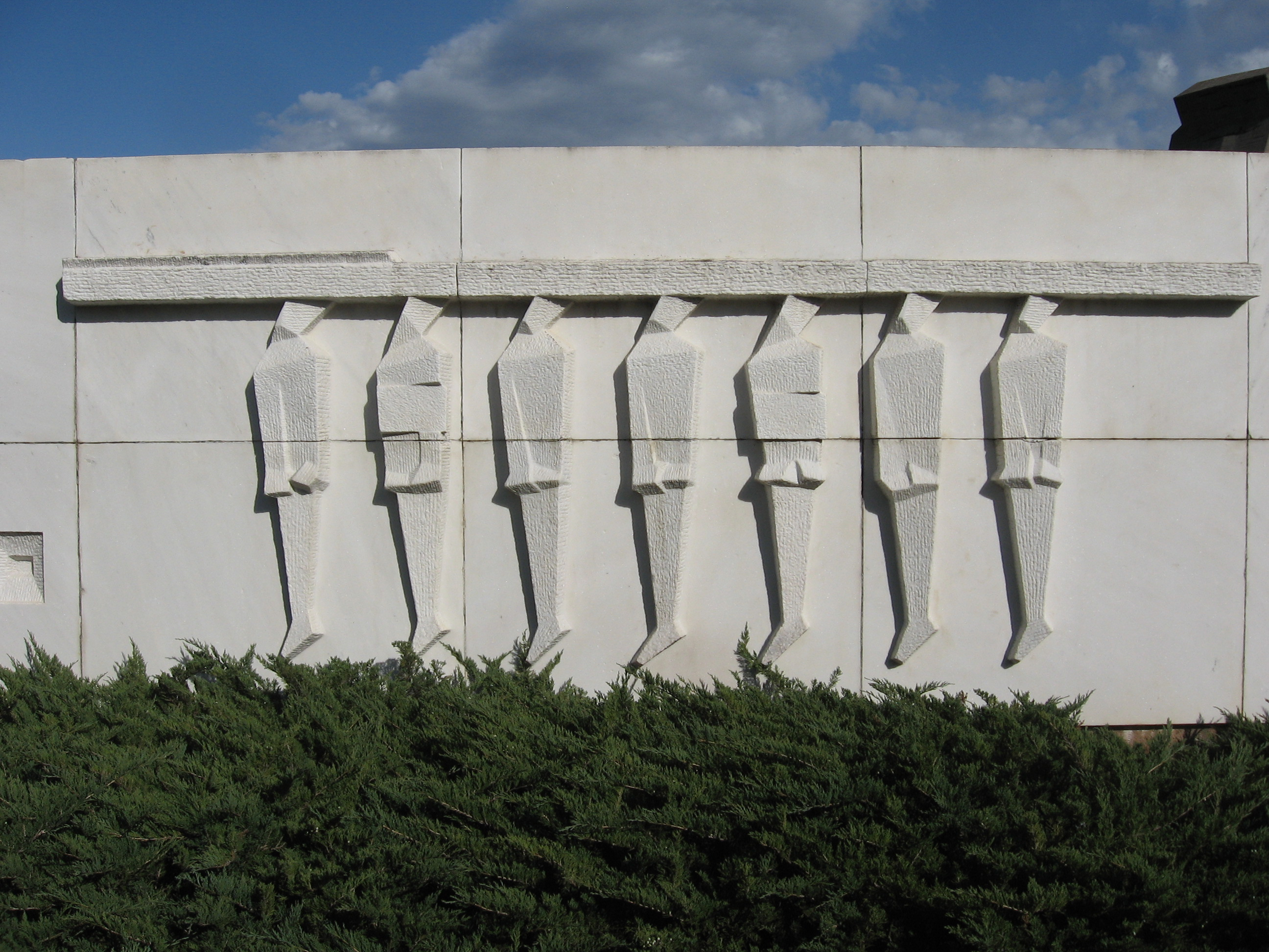 Детаљ са рељефа, други с лева на десно